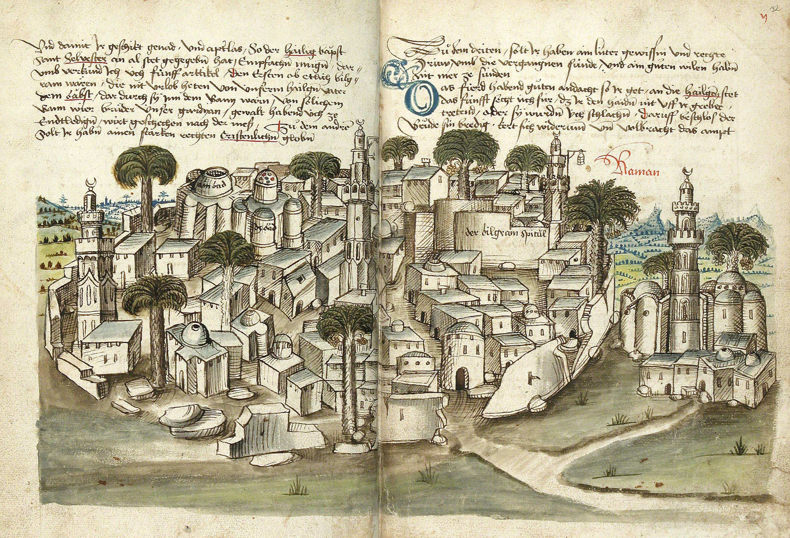 Doppelseite, aus Conrad Grünenberg: Beschreibung der Reise von Konstanz nach Jerusalem. Bodenseegebiet, um 1487. Badische Landesbibliothek Karlsruhe, Cod. St. Peter, pap. 32.